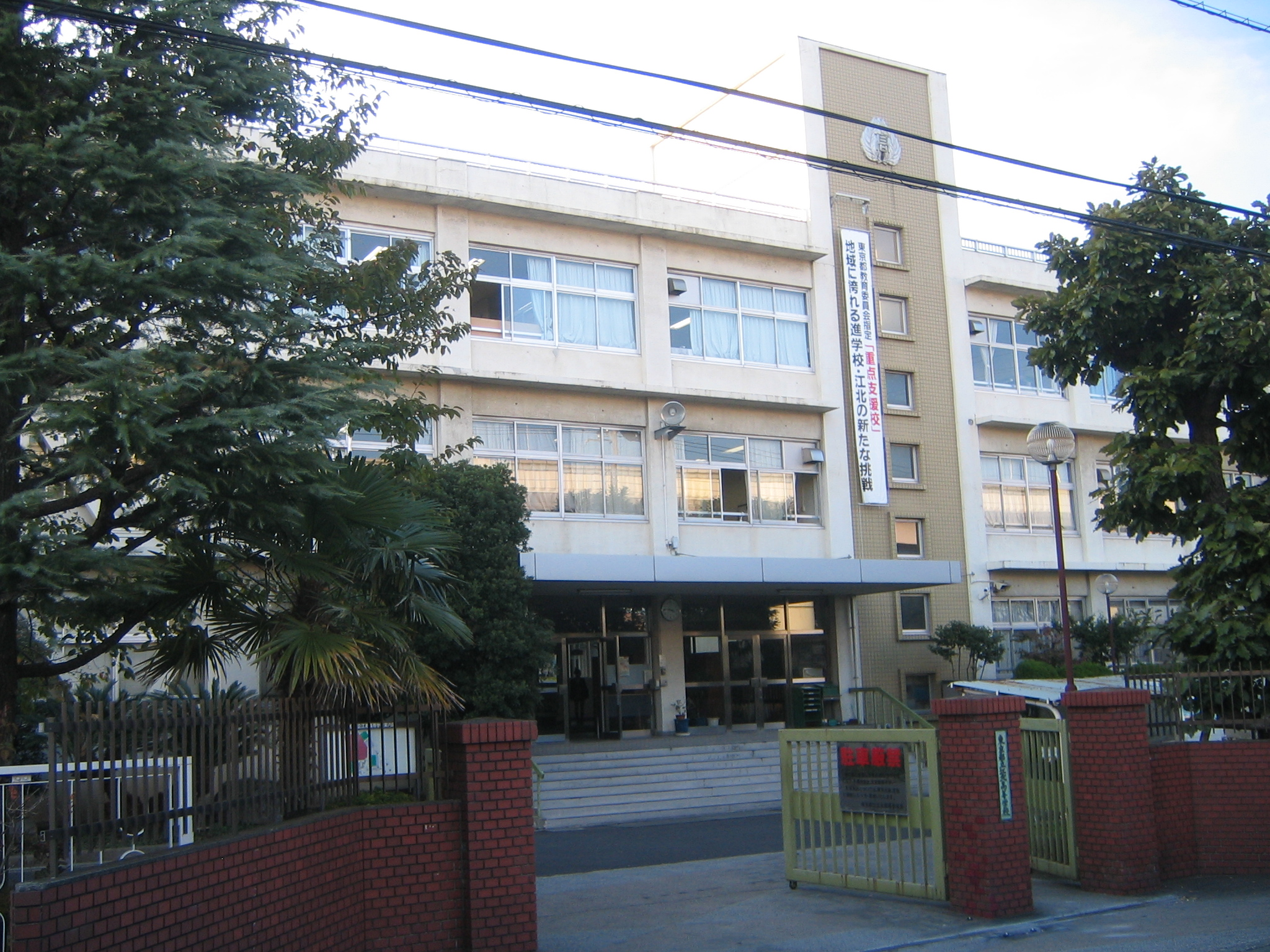 東京都立江北高等学校。東京都足立区西綾瀬 4-14-30